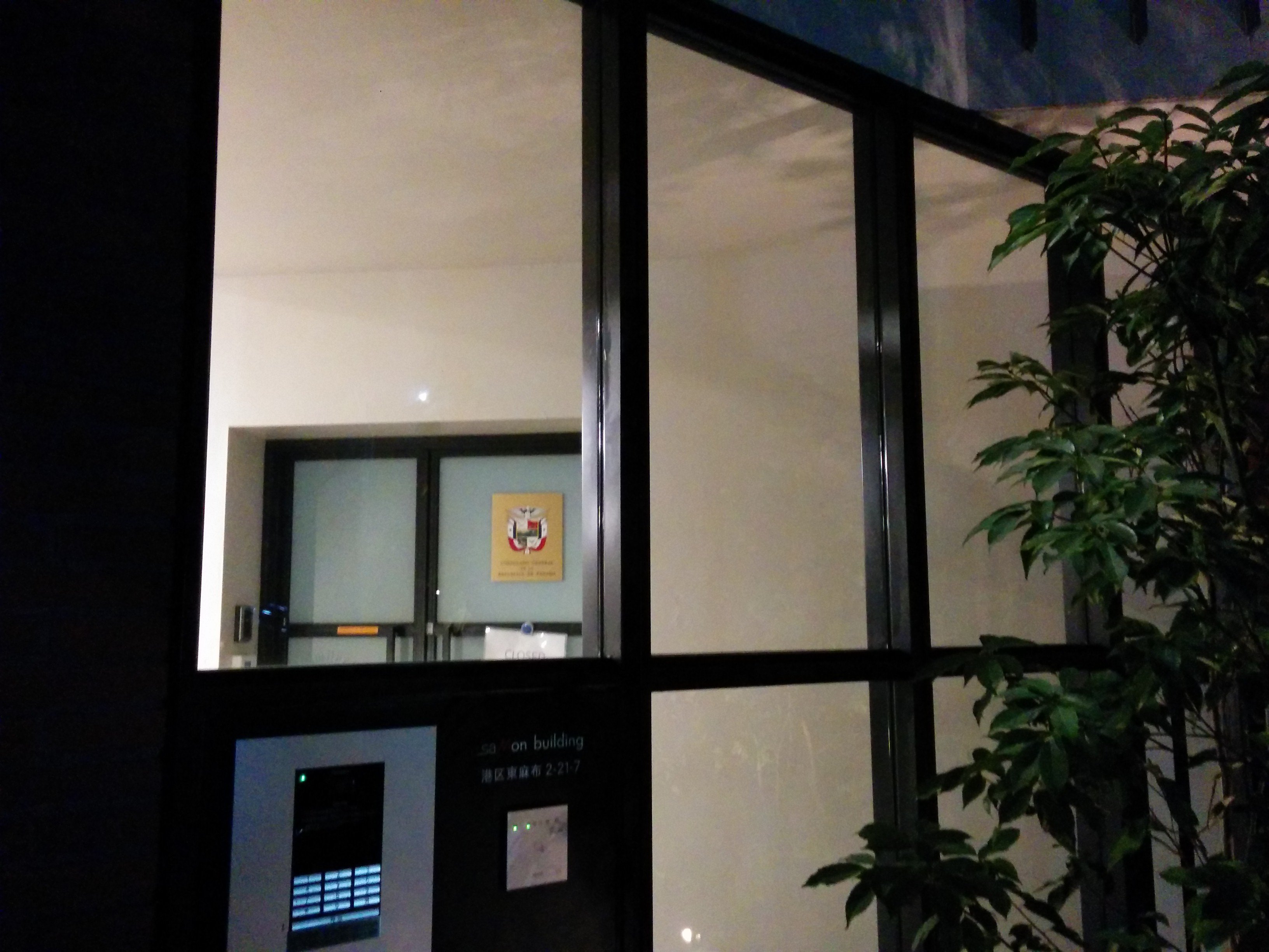 東京都港区東麻布2-21-7 Samon Building